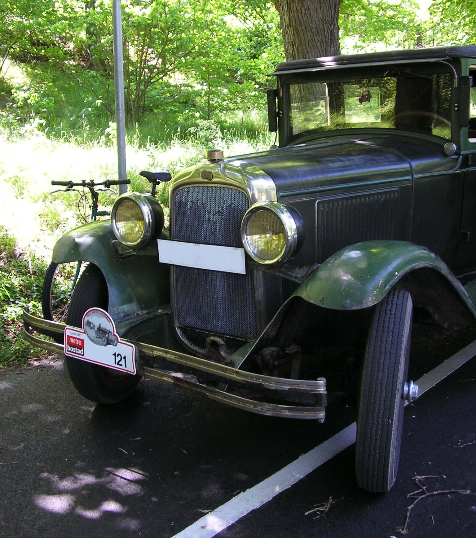 1928 Pontiac